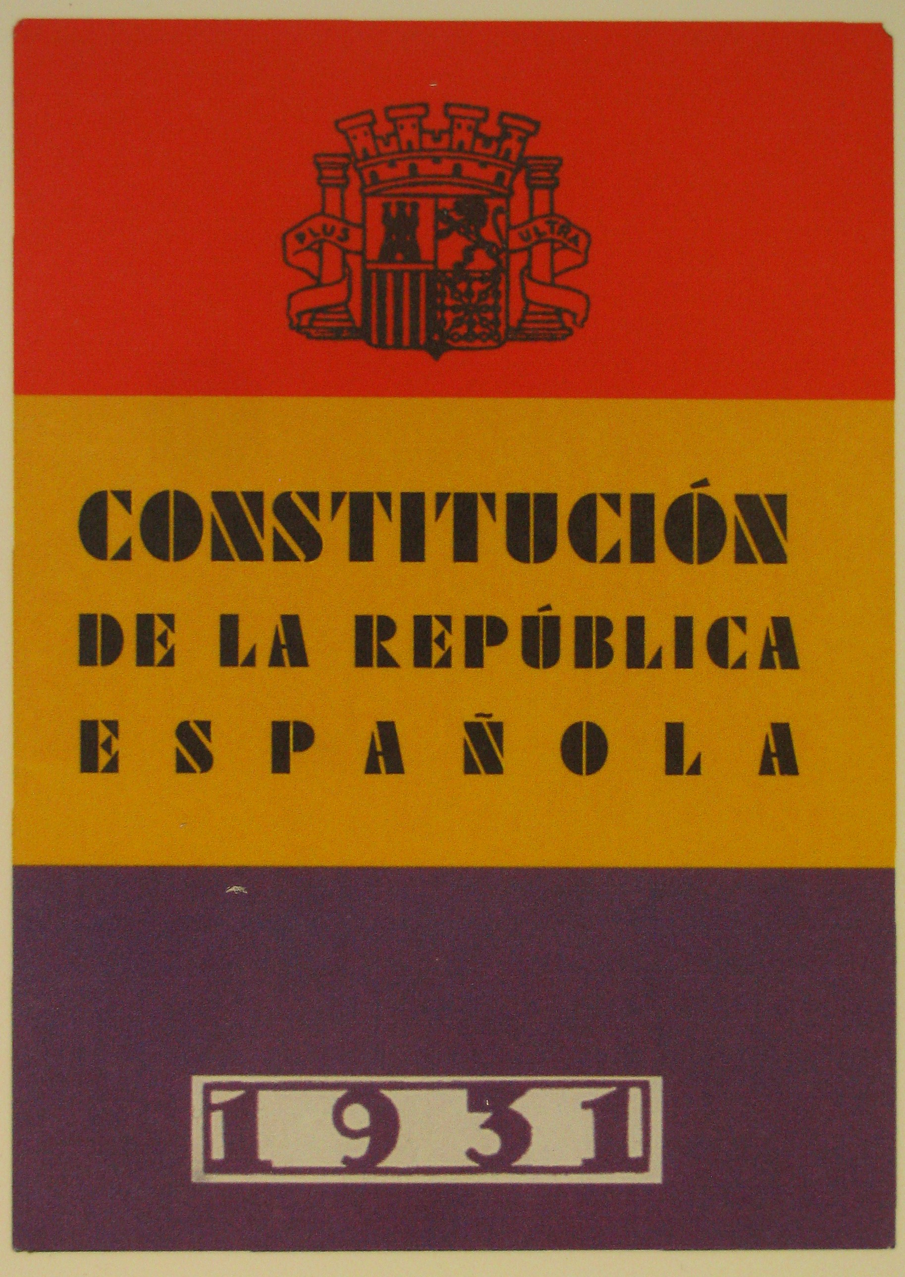 Imprenta Municipal. Exposición 'Futura'.